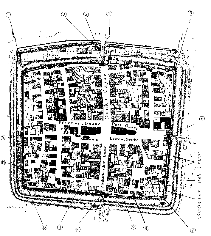 Stadtplan von Neustadt a.d. Donau aus dem Jahre 1819